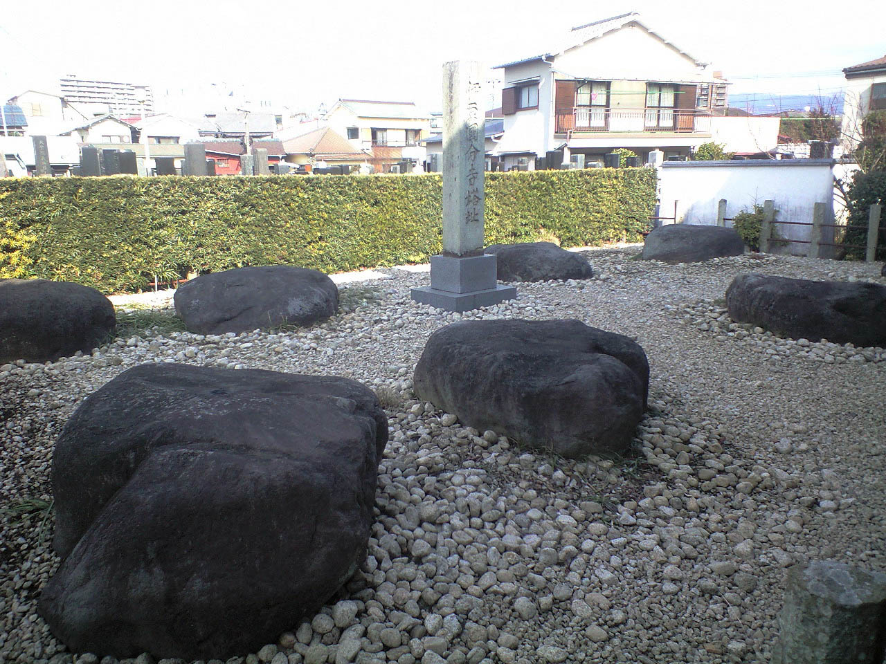 静岡県三島市泉町、伊豆国分寺塔跡（1958年（昭和33年）日本国の史跡に指定）